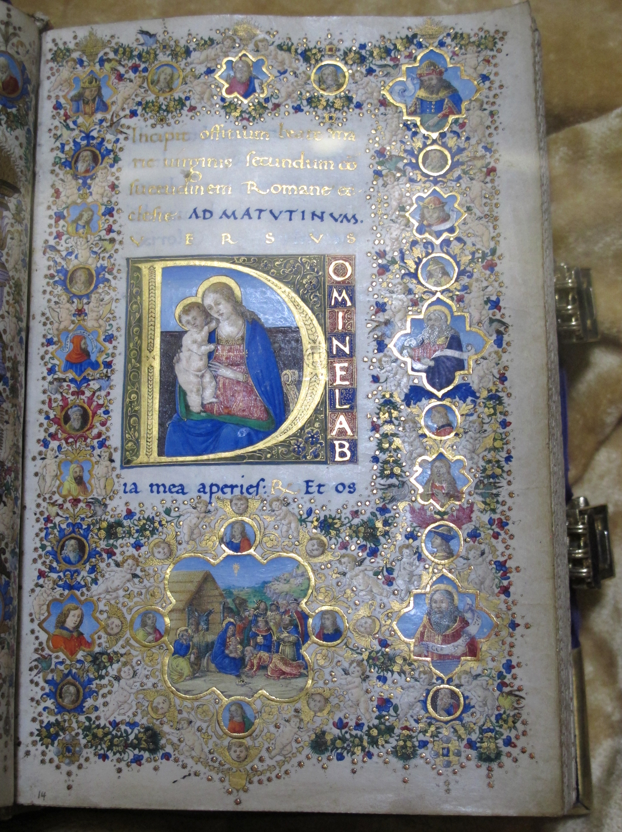 Libro d'ore di luisa de' medici, francesco rosselli e gherardo di giovanni, 1485, bibl. laurenziana